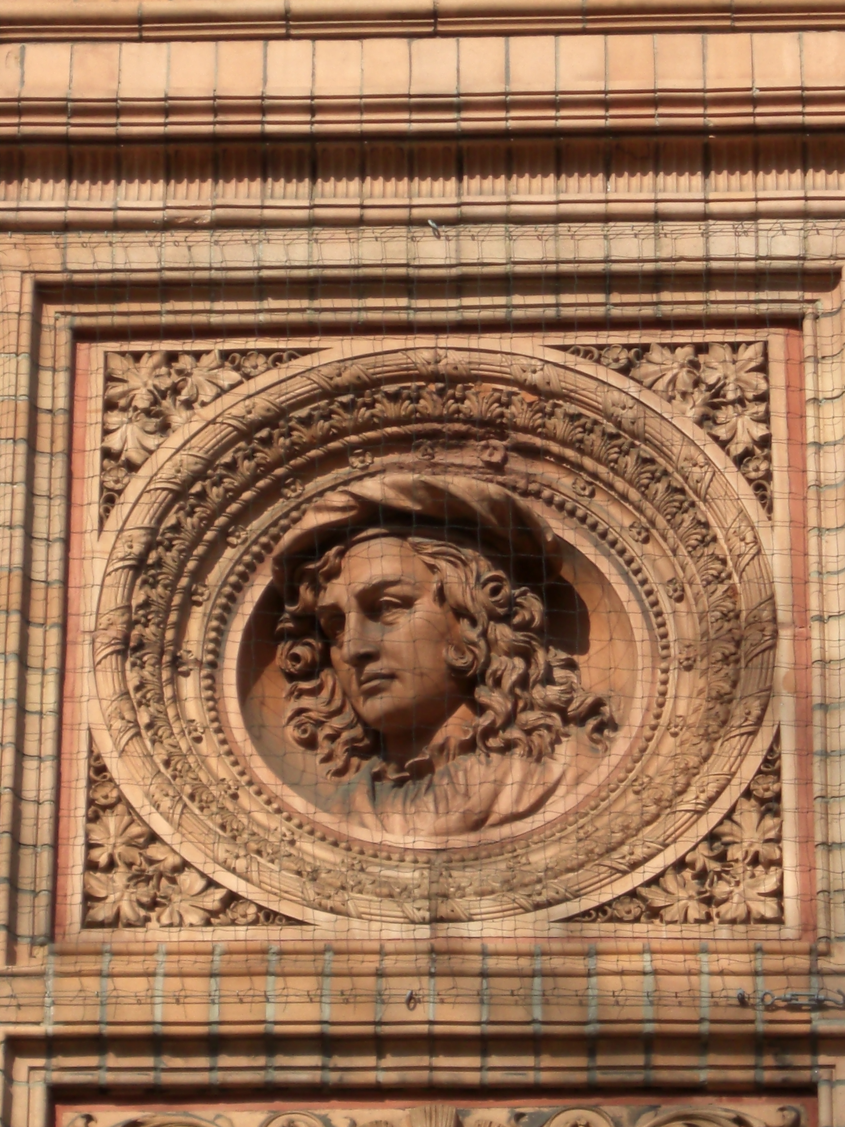 Medaillon von Jacob Isaacksz. van Ruisdael (etwa 1628-1682), Maler; Jacob van Ruisdael (1628/1629–1682) Alternative names Jacob van Ruysdael, Jacob Isaacksz. van RuisdaelDescriptionDutch painter, draughtsman and etcherDate of birth/death 1628 or 1629 date QS:P,+1628-00-00T00:00:00Z/8,P1319,+1628-00-00T00:00:00Z/9,P1326,+1629-00-00T00:00:00Z/9 March 1682Location of birth/death Haarlem (?) AmsterdamWork period1646-1682Work location Haarlem (1648-1655), Rhenen (1649), Bad Bentheim (1650), Steinfurt (1650), Amsterdam (1653-1681)Authority control : Q213612 VIAF: 89550506 ISNI: 0000 0001 1774 0724 ULAN: 500027077 LCCN: n82062822 NLA: 36526880 WorldCat creator QS:P170,Q213612 Kunsthalle Hamburg Native nameHamburger KunsthalleLocationHamburg, GermanyCoordinates53° 33′ 18″ N, 10° 00′ 10″ E Established1869Web page control : Q169542 VIAF: 140632142 ISNI: 0000 0004 0565 0096 LCCN: n50021971 GND: 2013051-X SUDOC: 02645310X WorldCat institution QS:P195,Q169542 Note: this is a fantasy portrait, as there is no portrait known of Jacob van RuisdaelThis is a photograph of an architectural monument.